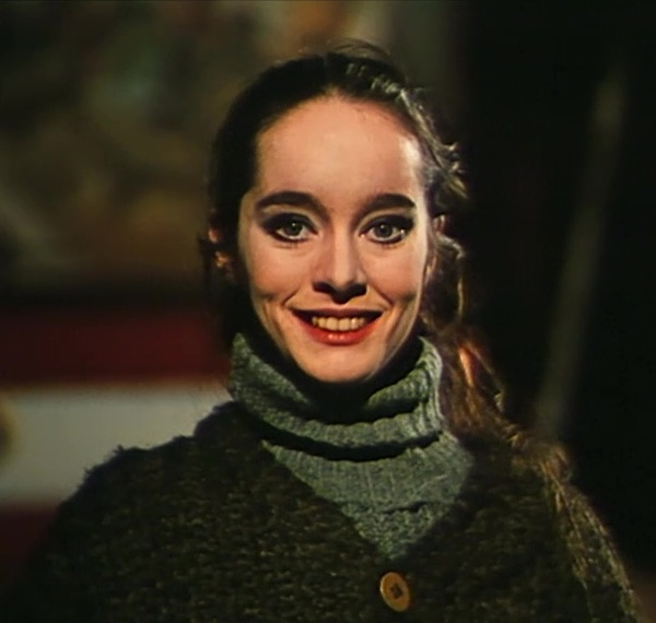 Victoria Chaplin nel film I clowns (1970)